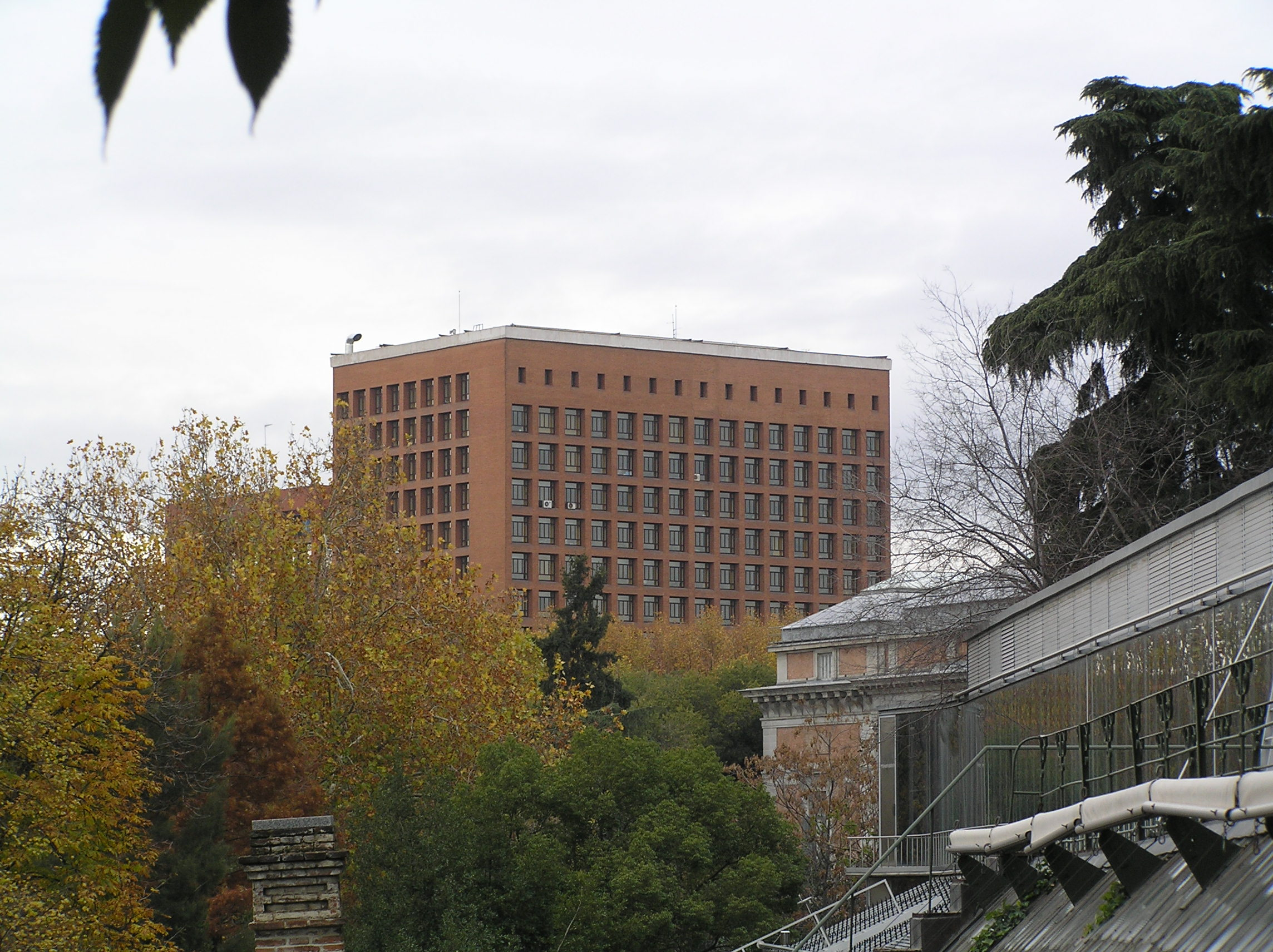 Ministerio de Sanidad y Consumo español (Madrid), obra de Francisco de Asis Cabrero, 1949. Foto tomada desde la Terraza Alta (o de los Laureles) del Real Jardín Botánico de Madrid. A la derecha, Invernadero de Exhibición del Real Jardín Botánico y esquina del Museo del Prado